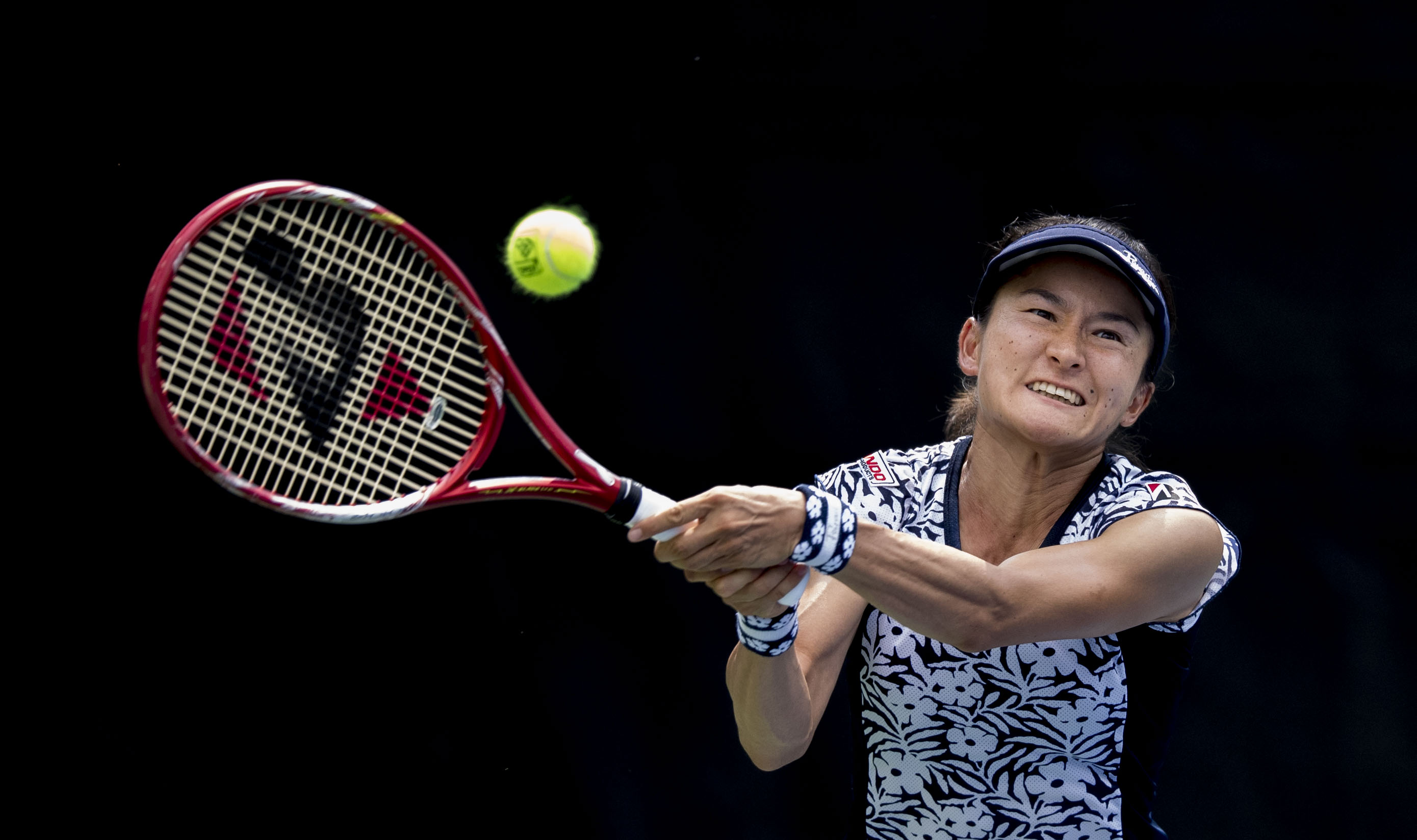 Citi Open Tennis 2017